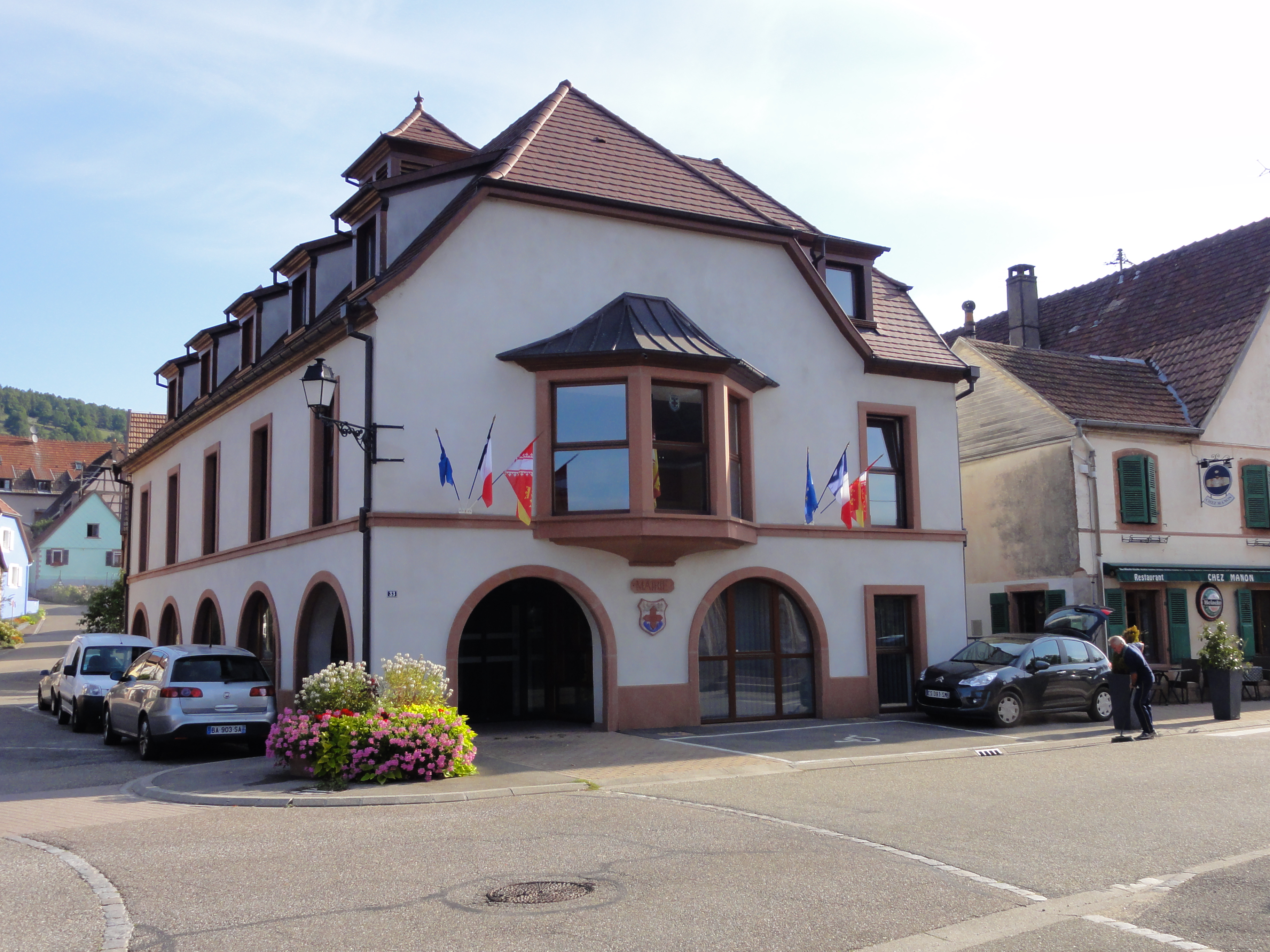 Alsace, Bas-Rhin, Triembach-au-Val, Mairie.